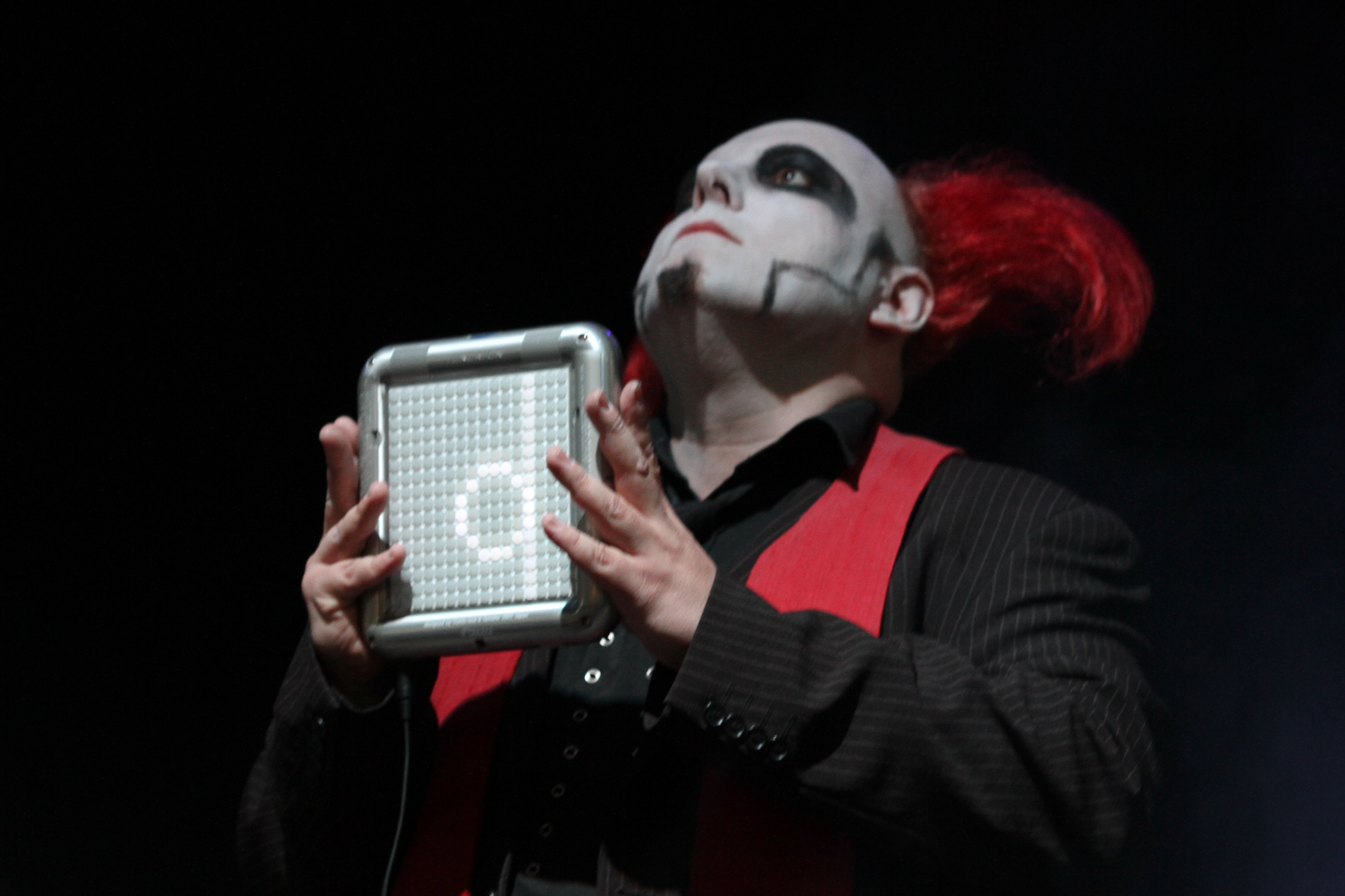 Bruno Kramm von Das Ich auf dem Wave-Gotik-Treffen 2013 in der Agra-Halle.